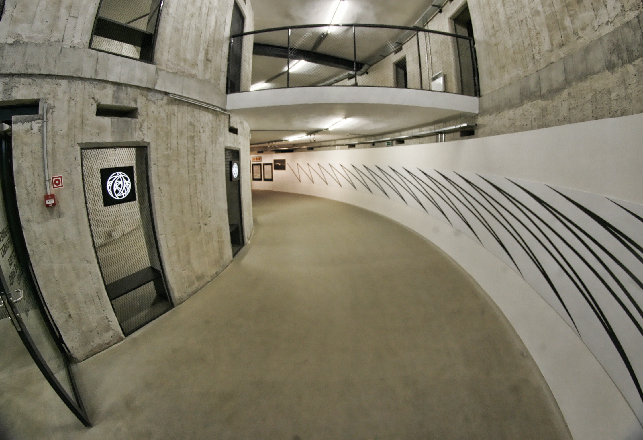 Muzeum Współczesne Wrocław, wystawa Zbigniewa Gostomskiego, fot. Krzysztof Zatycki